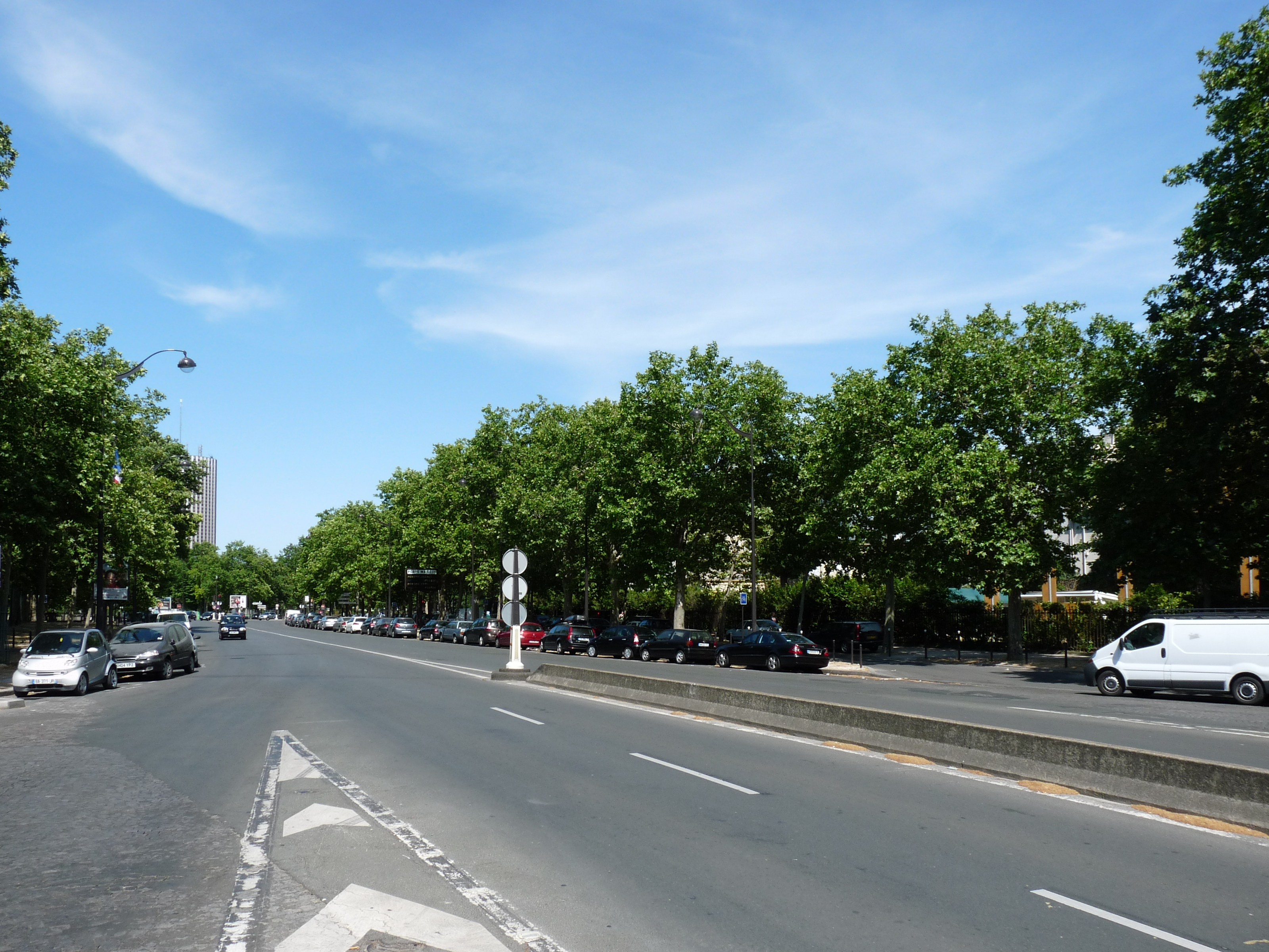 Le boulevard de l'amiral Bruix à Paris, vu en direction de la porte Maillot